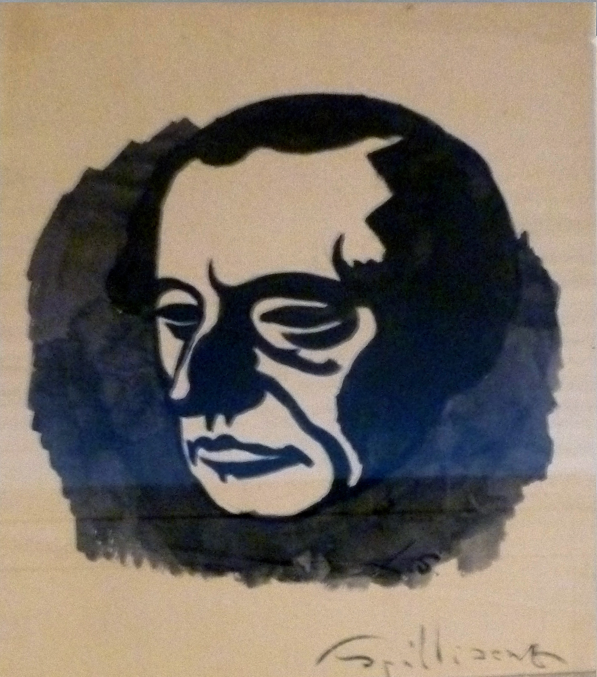 Portret van Franz Hellens - tekening door Léon Spilliaert (1920); potlood, Oost-Indische inkt, penseel op papier; privéverzameling